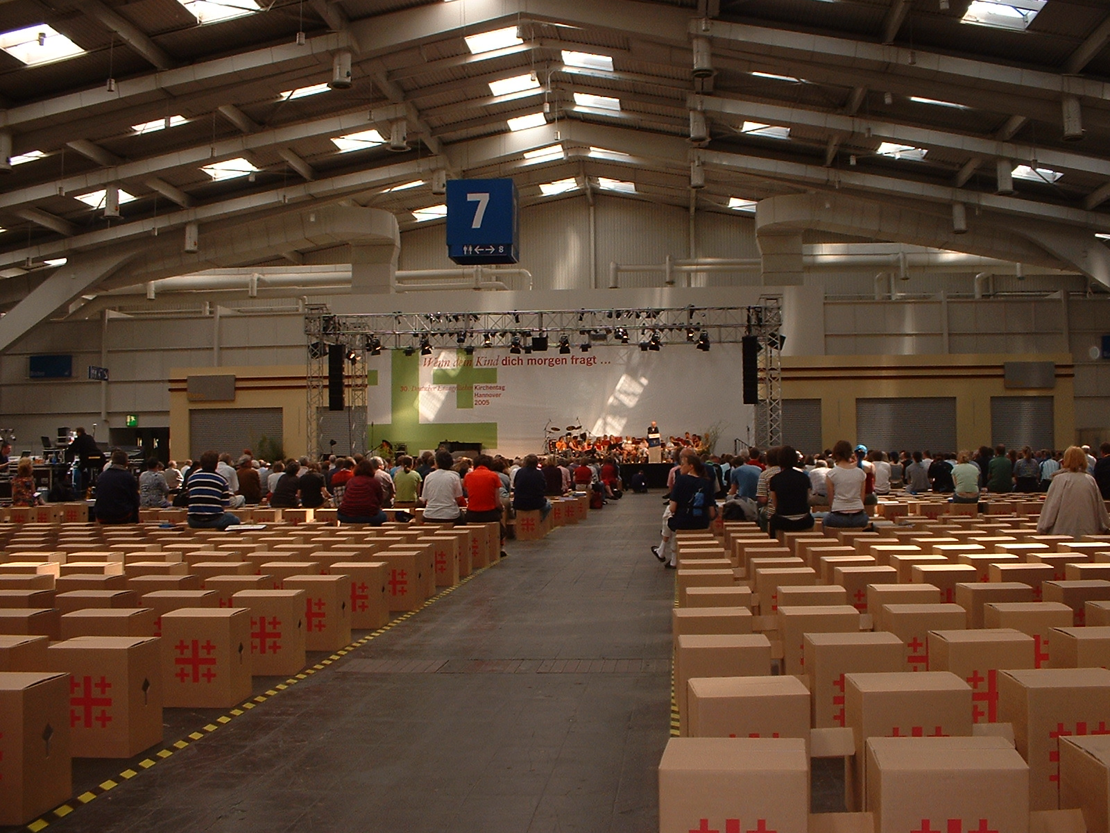 Veranstaltung Halle 7 beim DEKT 2005 in Hannover